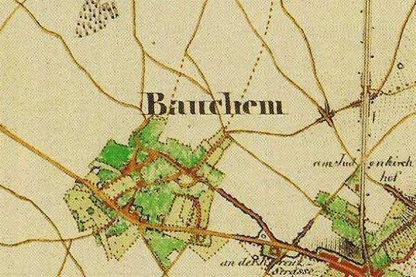 Preußische Kartenaufnahme 1846 - Uraufnahme - (5002 Geilenkirchen)